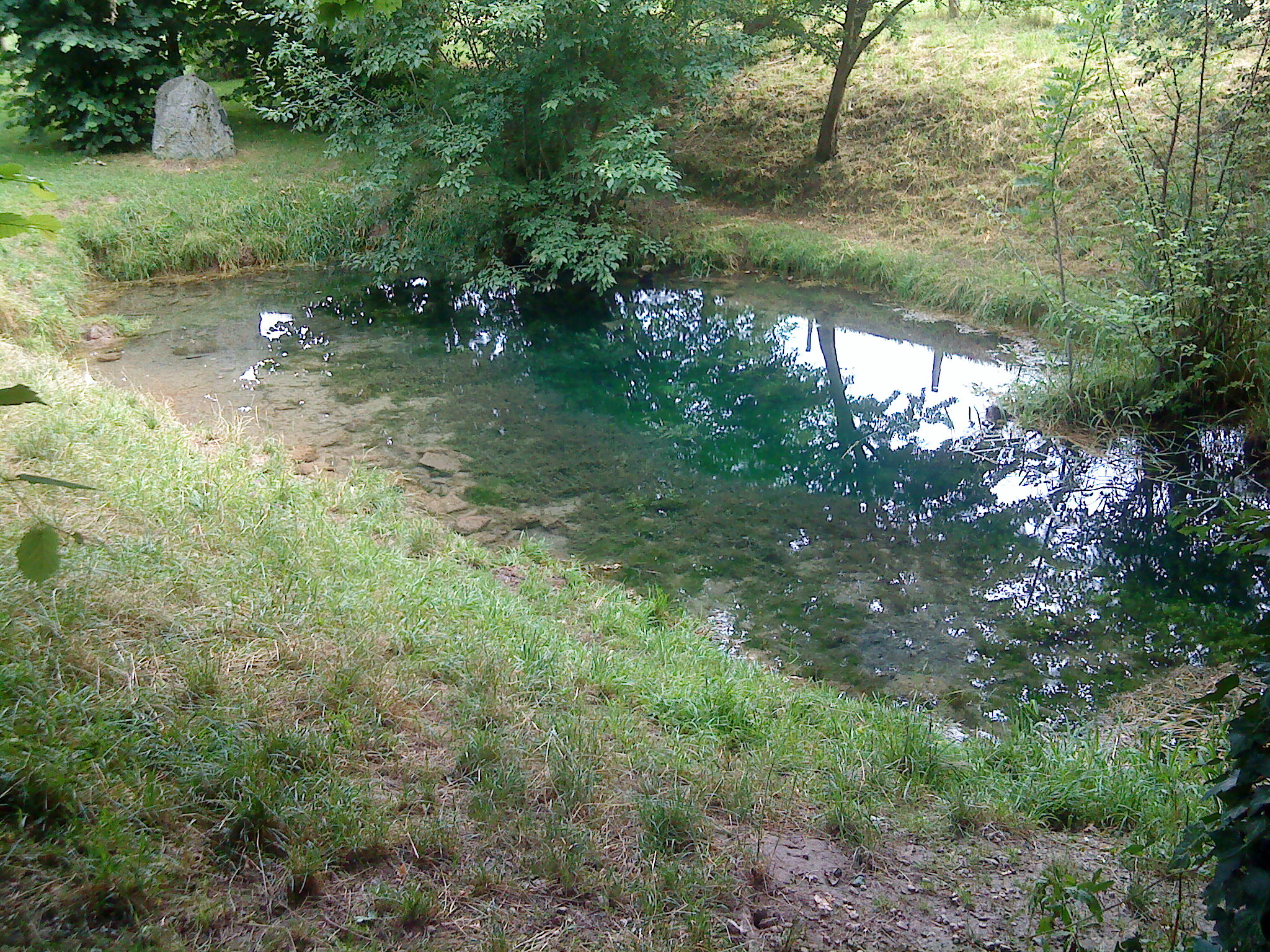 Die Nettequelle in Herrhausen am Harz